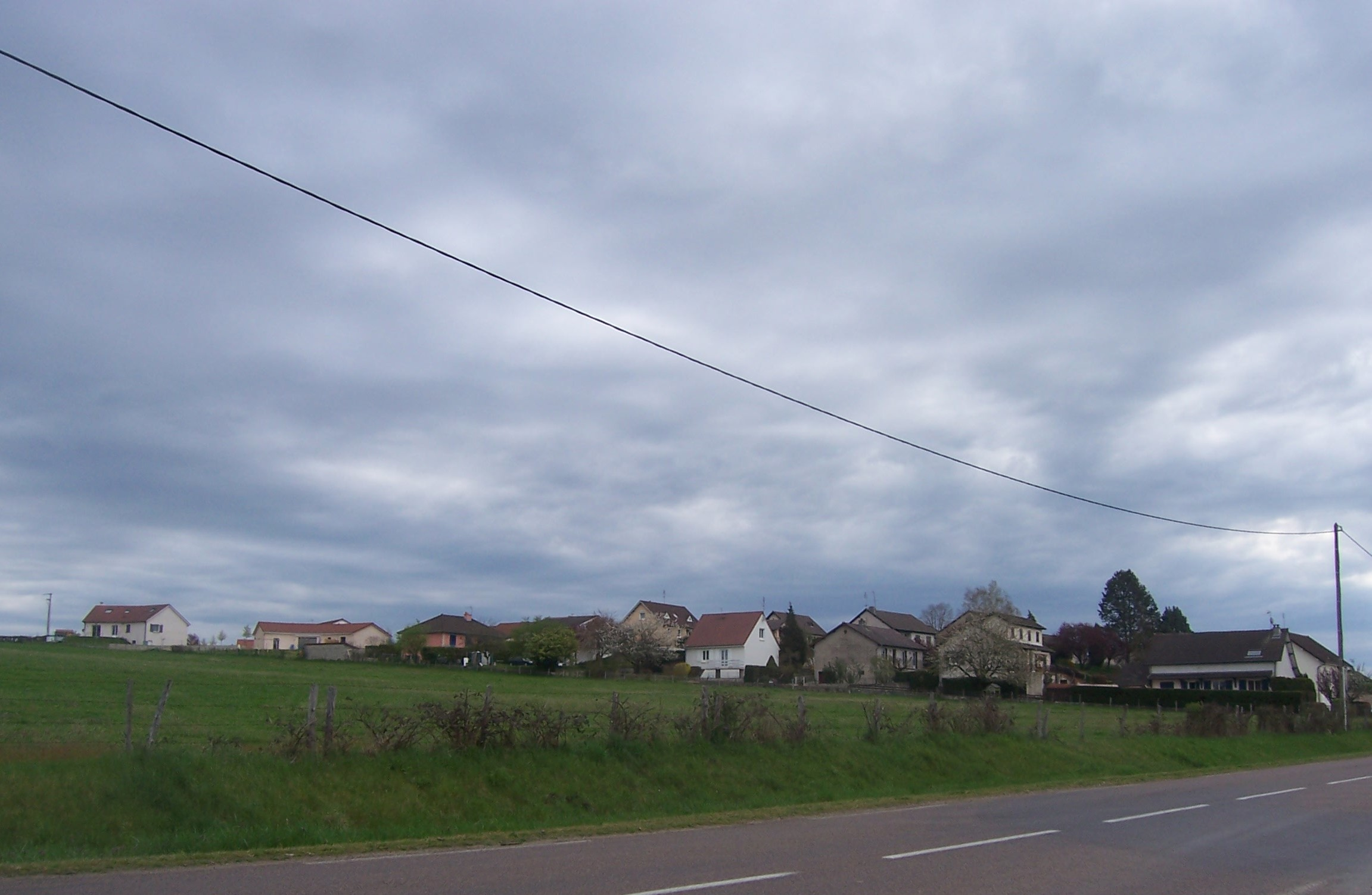 Saint-Léger-lès-Paray